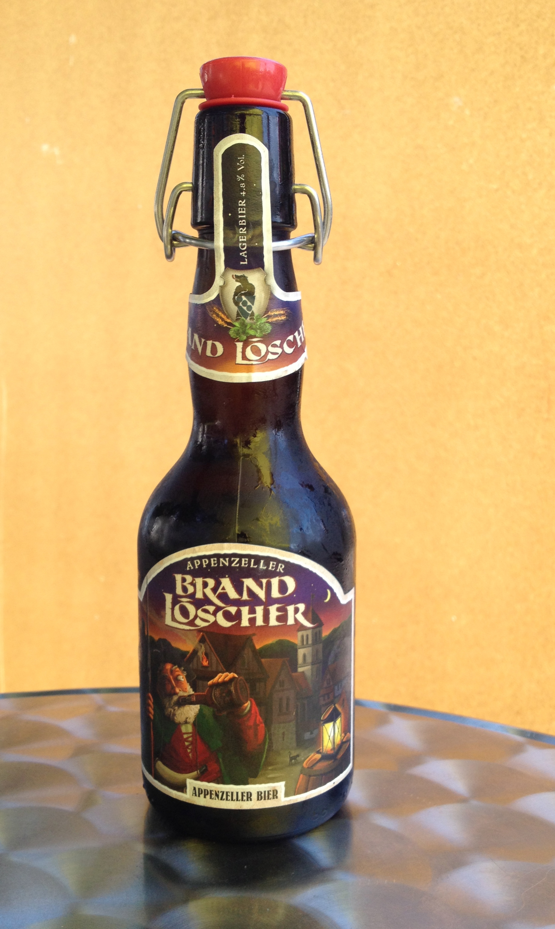 Bier der Brauerei Locher